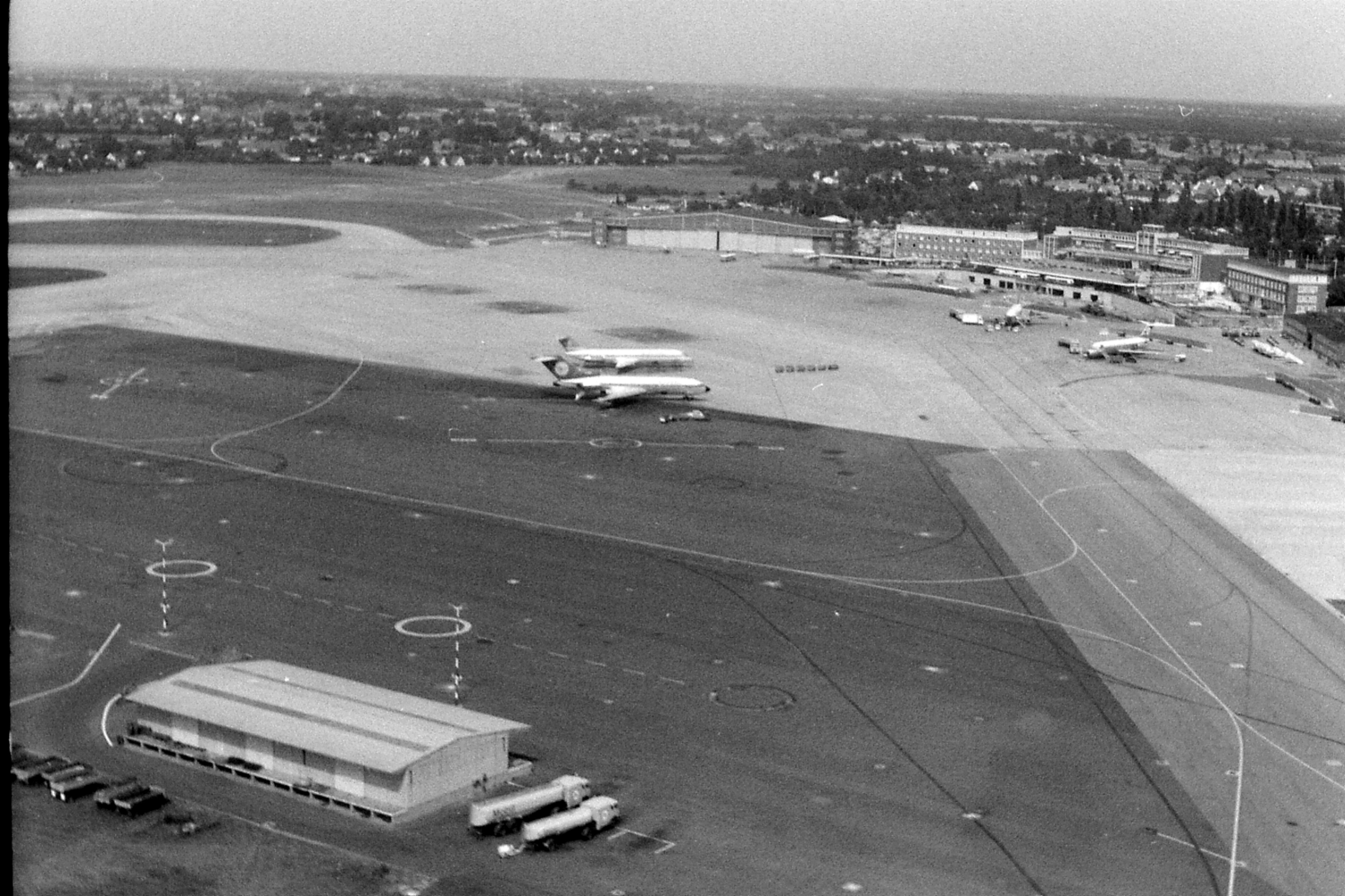 Flughafen Hamburg Ende der 60er Jahre